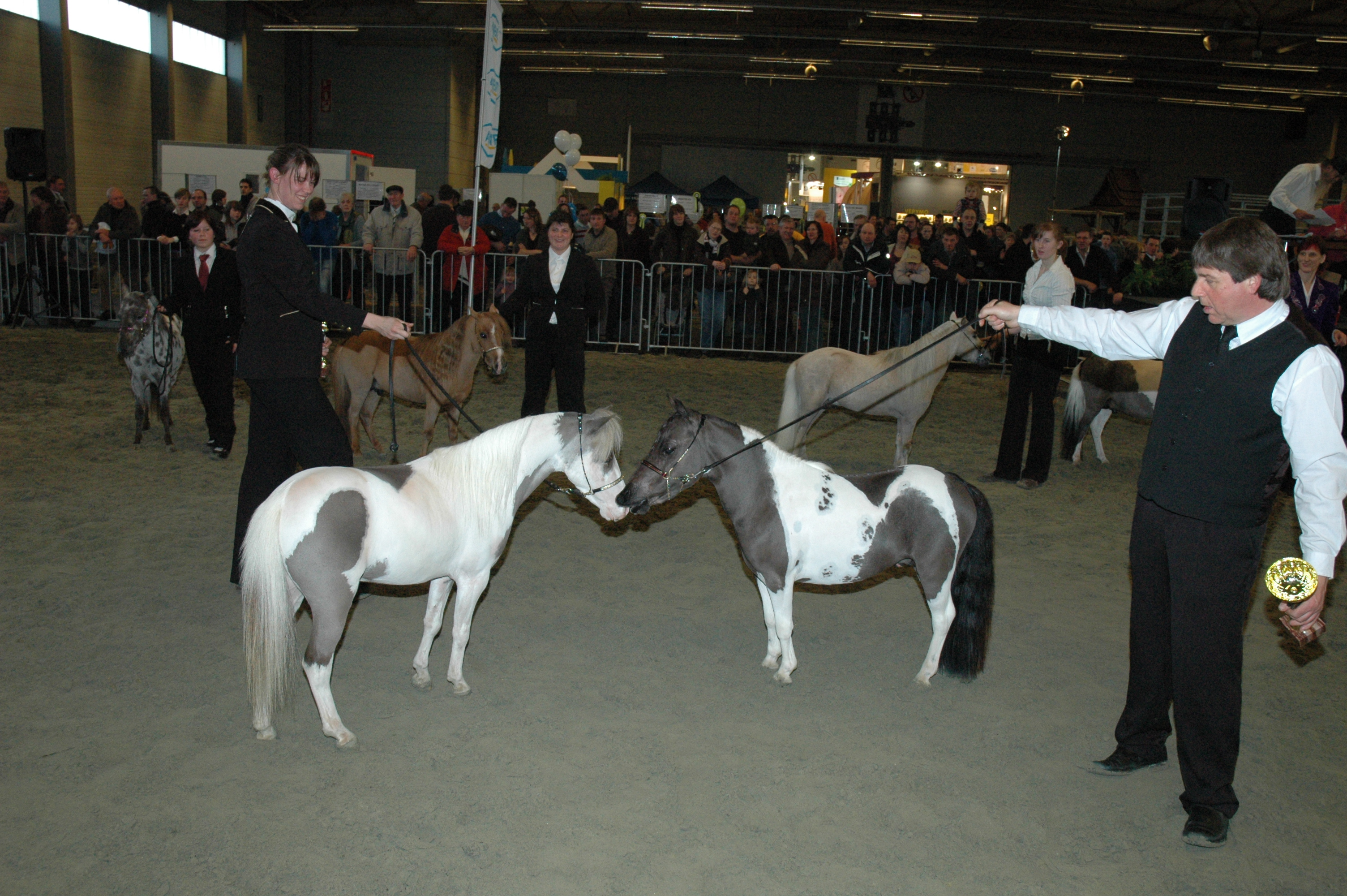 Miniatuurpaardjes prijskamp - Agriflanders 2009